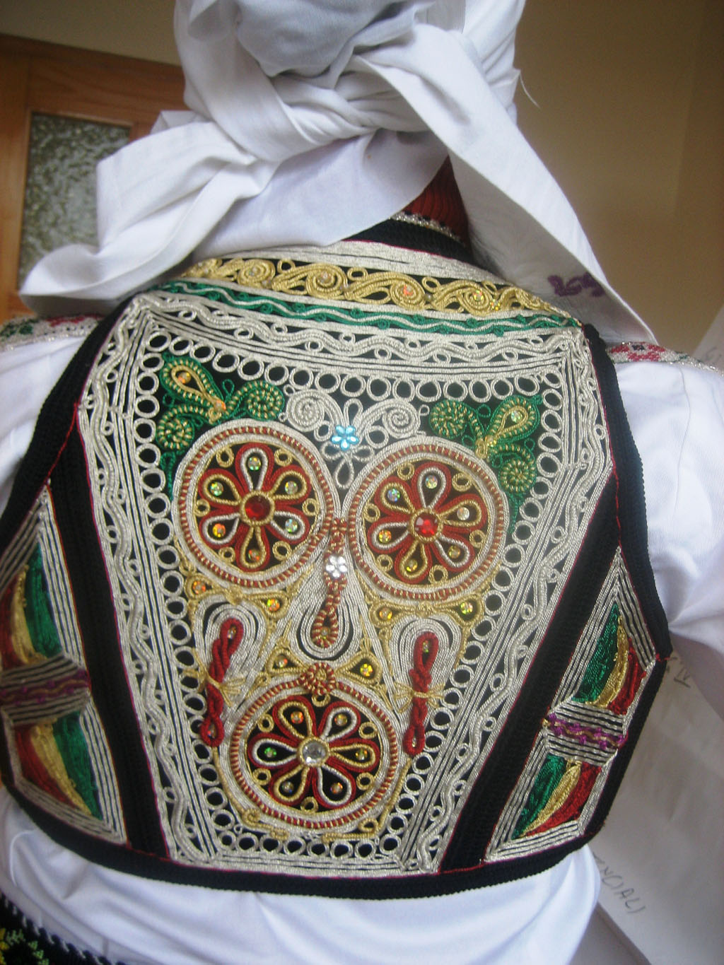 Jelek i veshjes se Hasit